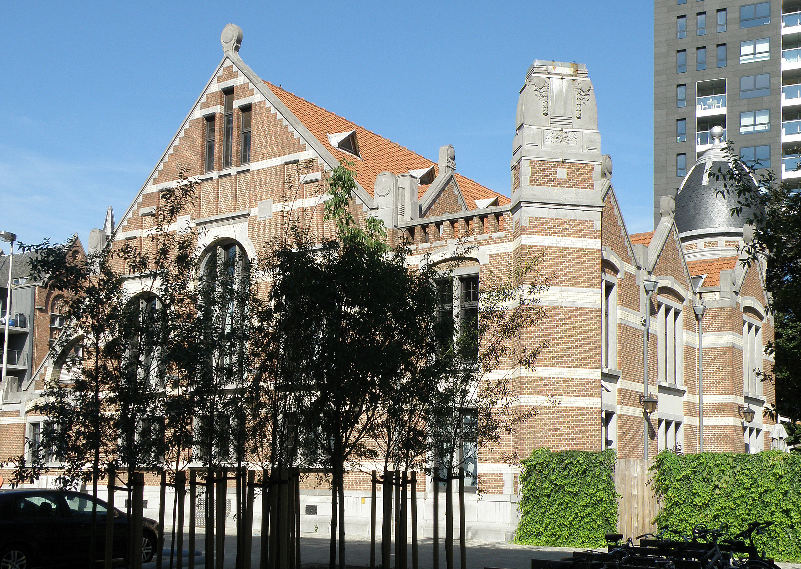 Antwerpen (België). Schuilplaats voor Werklieden, gelegen Londenstraat, anno 1908 opgetrokken in eclectische stijl n.o.v. archit. Jan van Asperen en Alexis Van Mechelen.